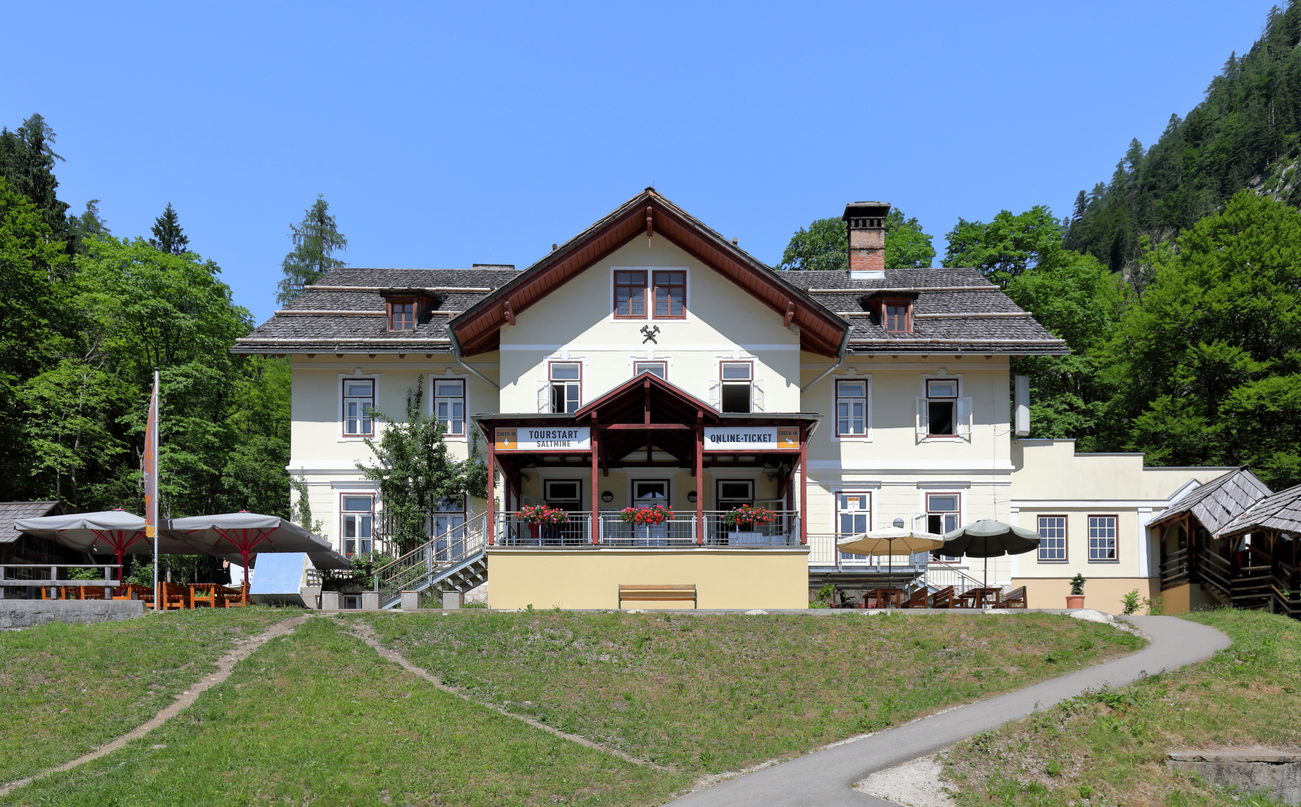 Der Salzwelten-Eingang bzw. das ehemalige Knappenhaus am Salzberg in der oberösterreichischen Marktgemeinde Hallstatt.